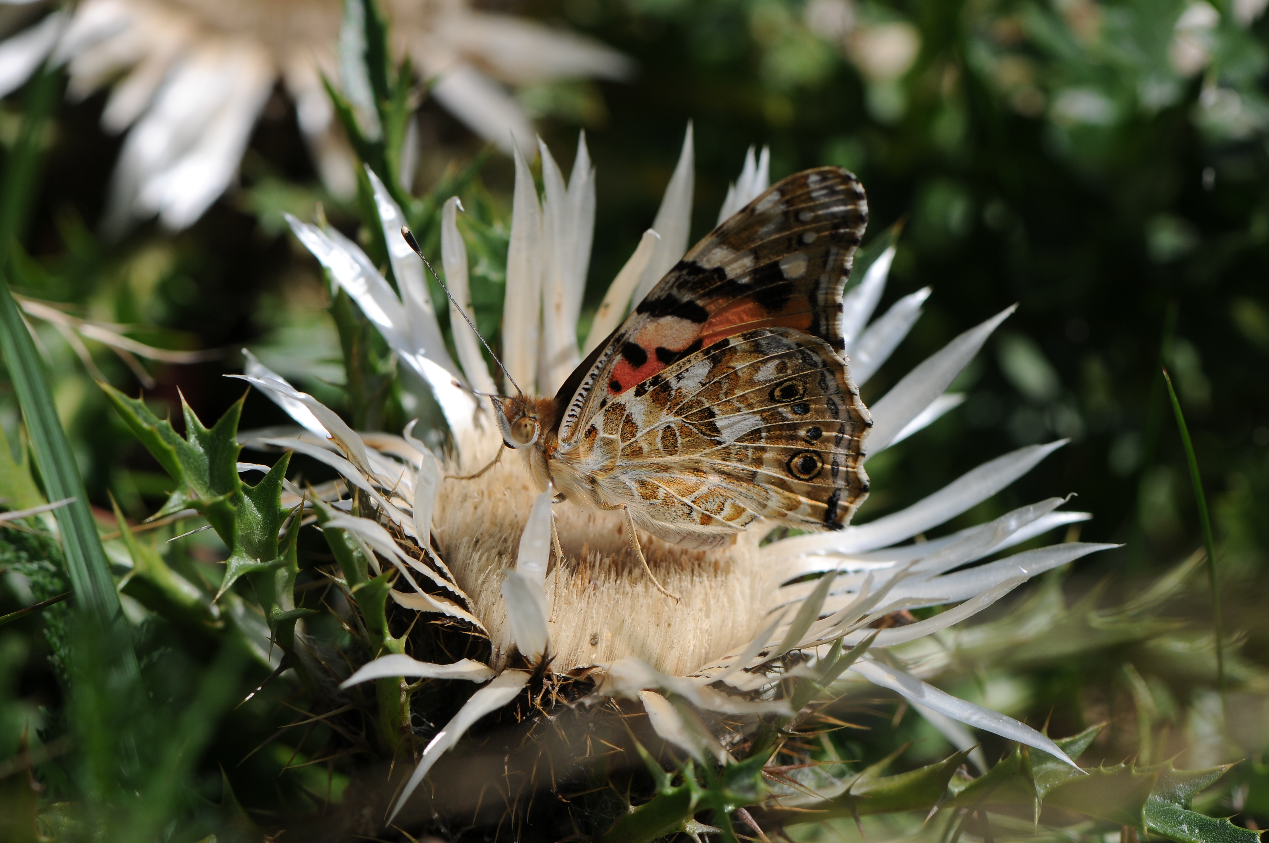 Vanessa cardui